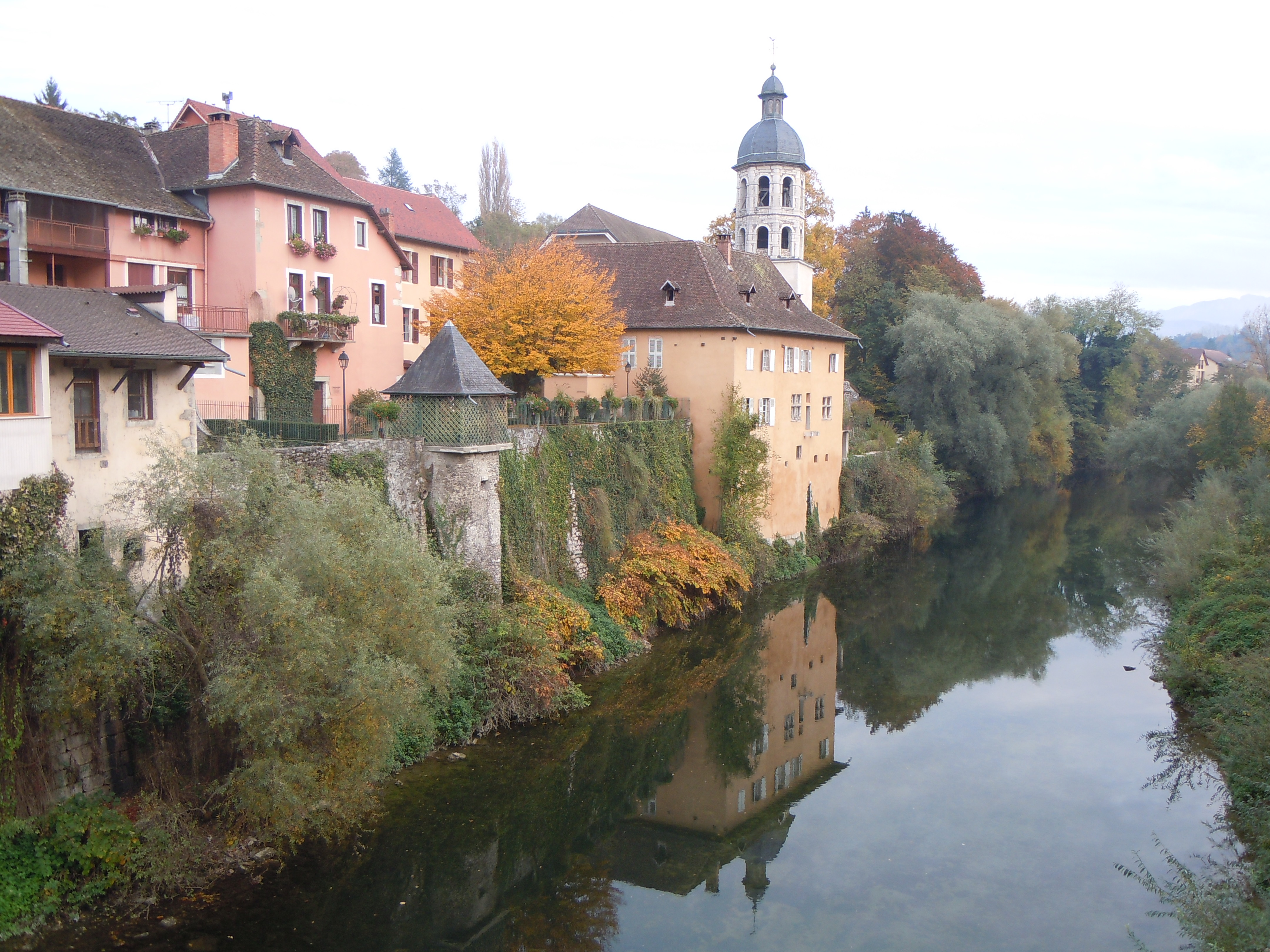 Eglise des Carmes au bord du Guiers - Le Pont de Beauvoisin (Savoie) - France